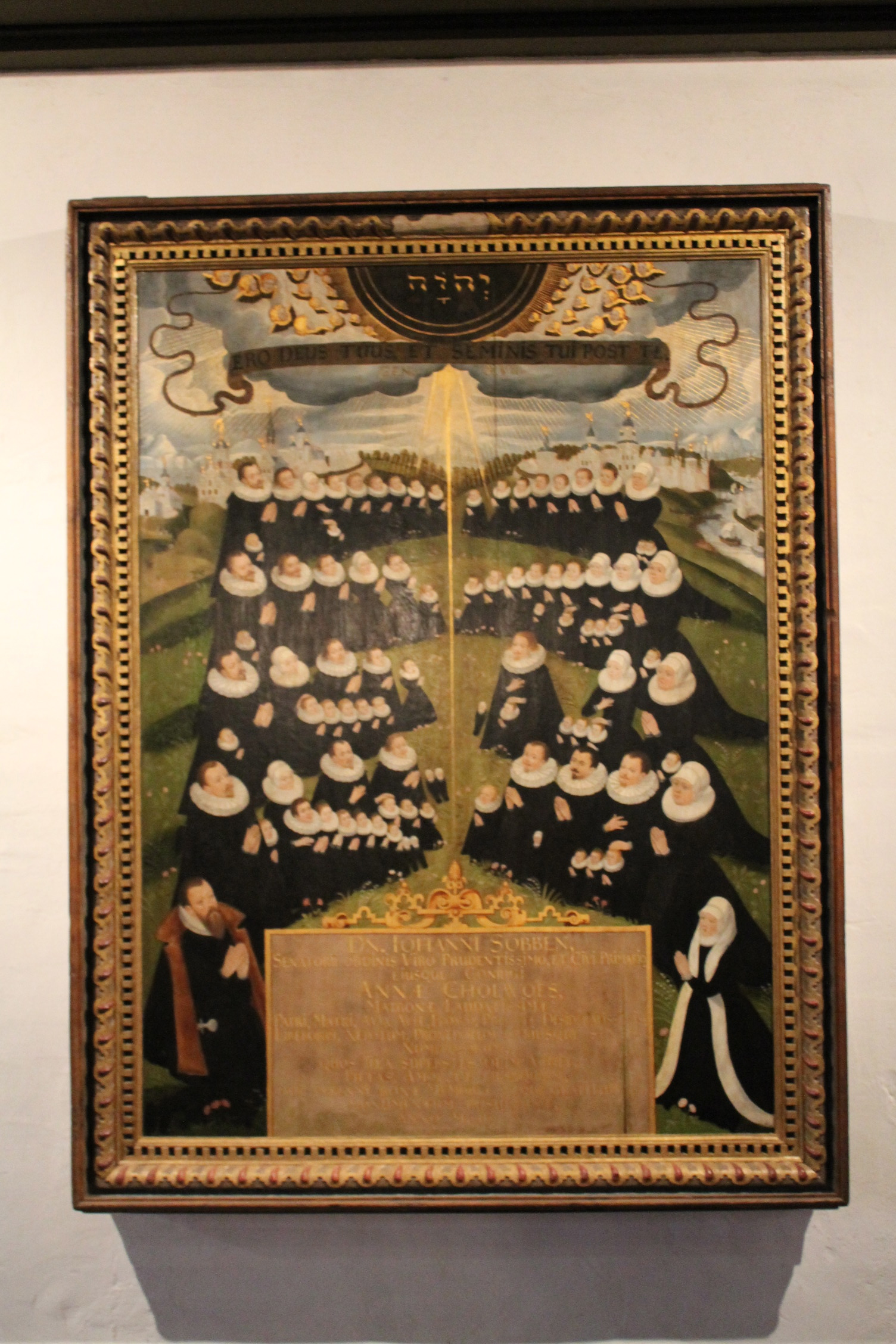 Gemälde einer Kaufmannsfamilie, St. Martini, Minden, unter der Westempore